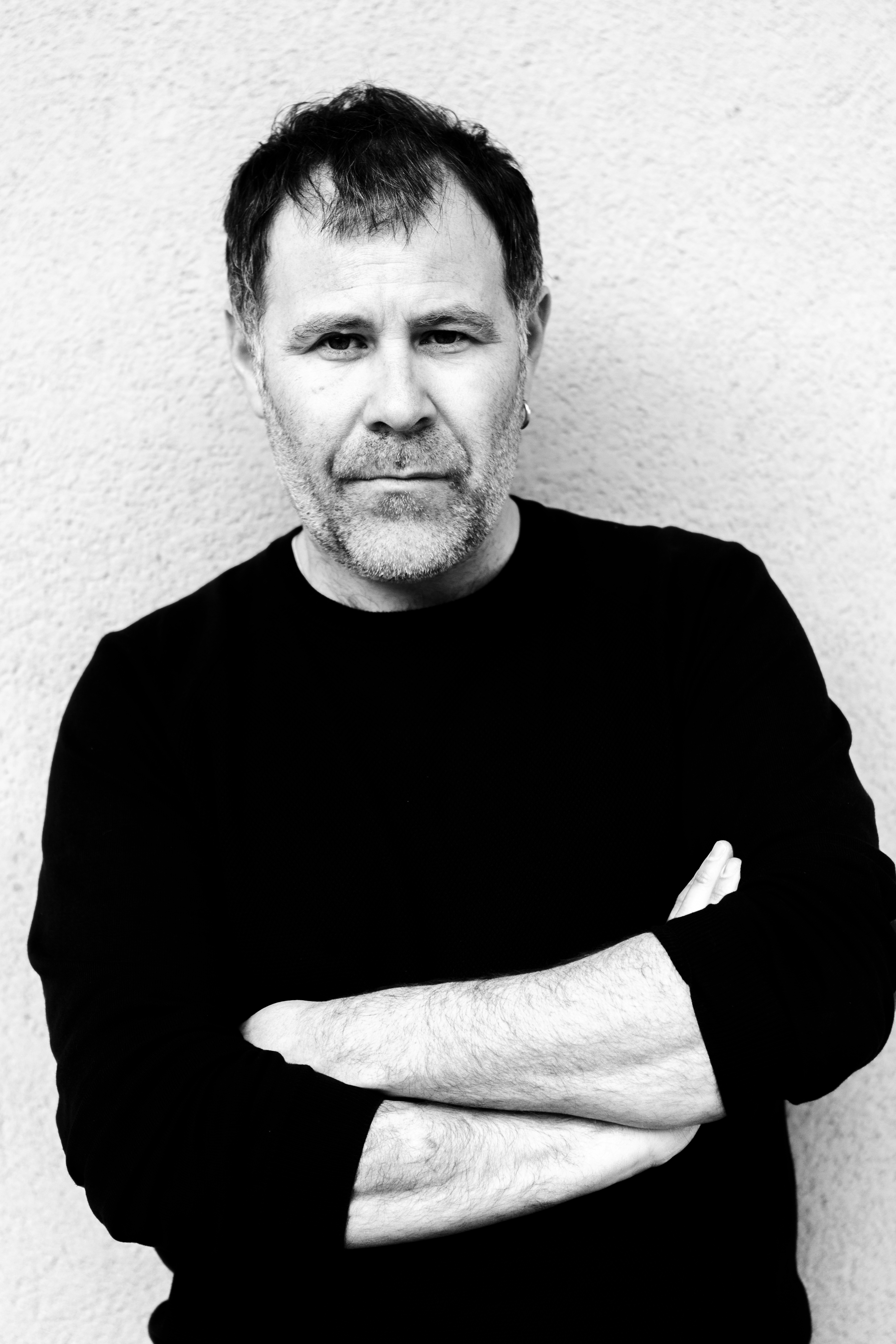 Actor vasco Ibarra Lizundia "Ander Lipus".